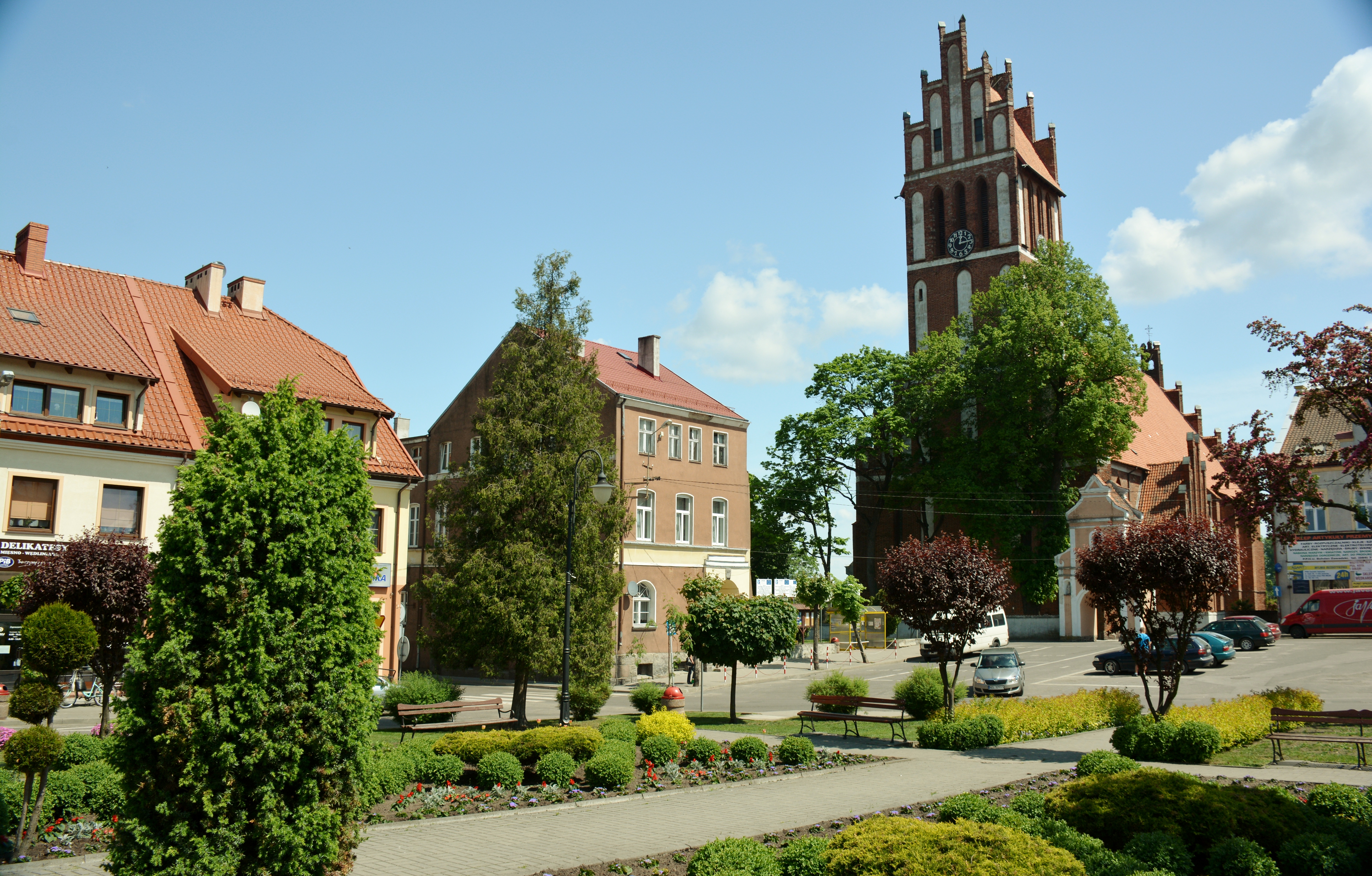 Jeziorany, Poland